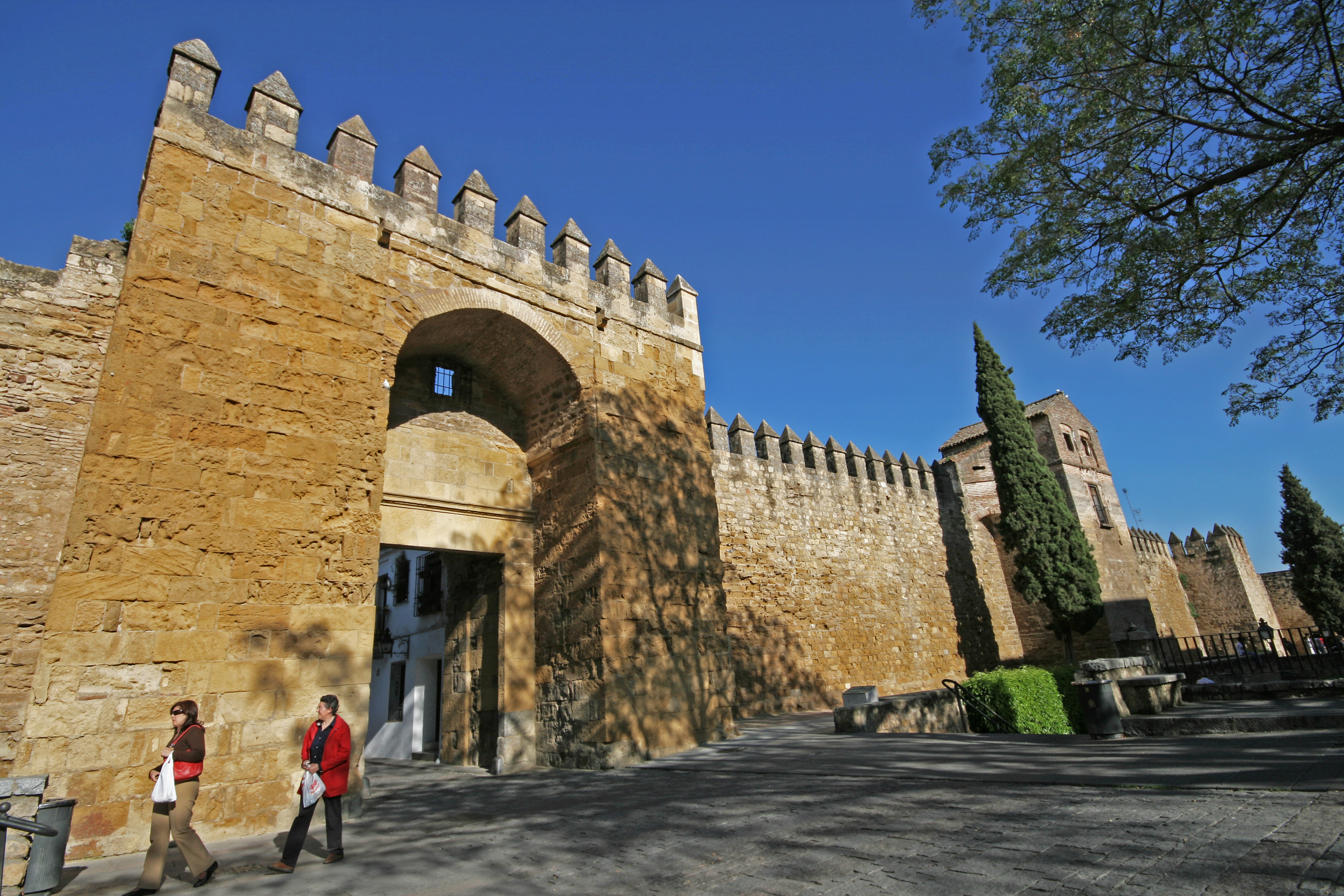 Muralla de la calle Cairuán y Puerta de Almodóvar (Córdoba, España).